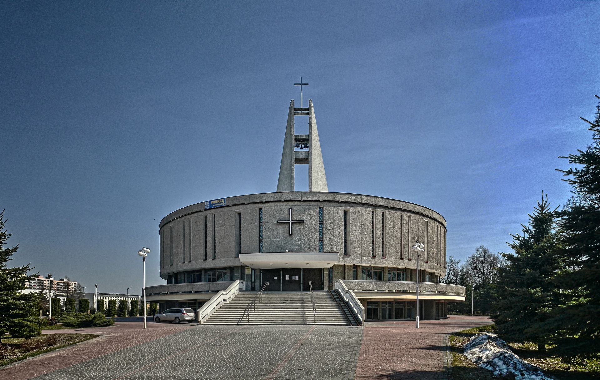 Kościół parafialny p.w. Najświętszej Marii Panny Matki Kościoła w Świdniku, woj. lubelskie.